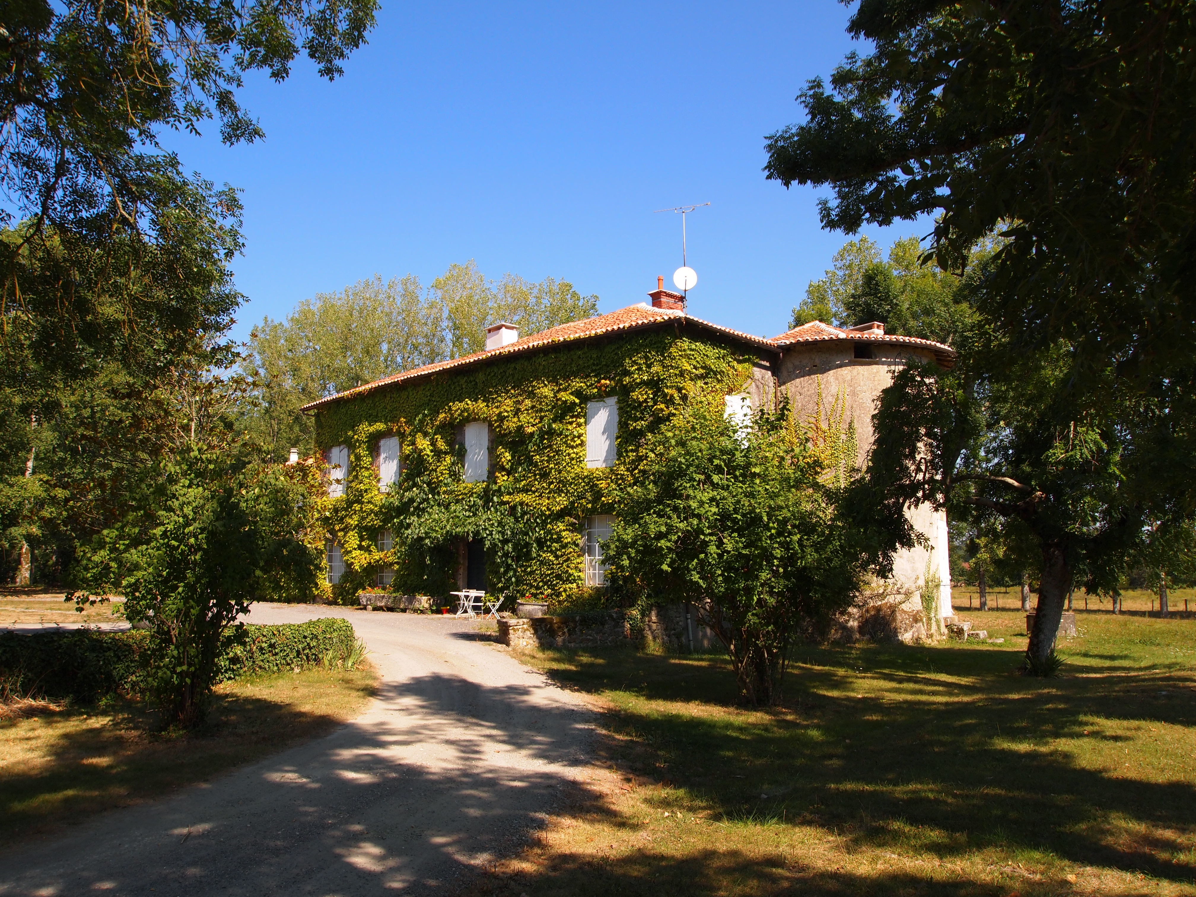 Logis de la Vergne, à Alloue en Charente (inscrit, 2002)